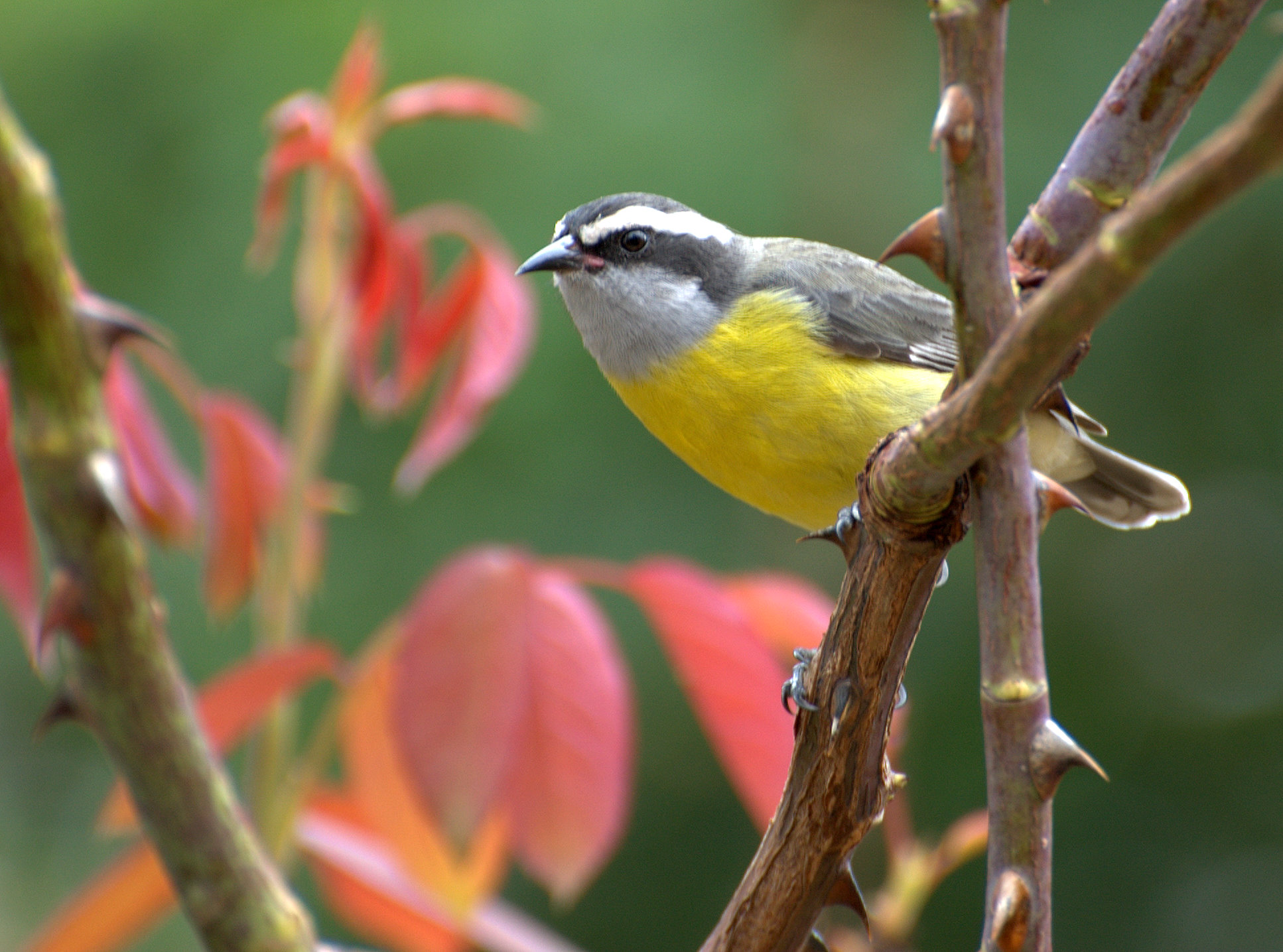 No quintal da casa dos meus pais na cidade de Piraju-SP